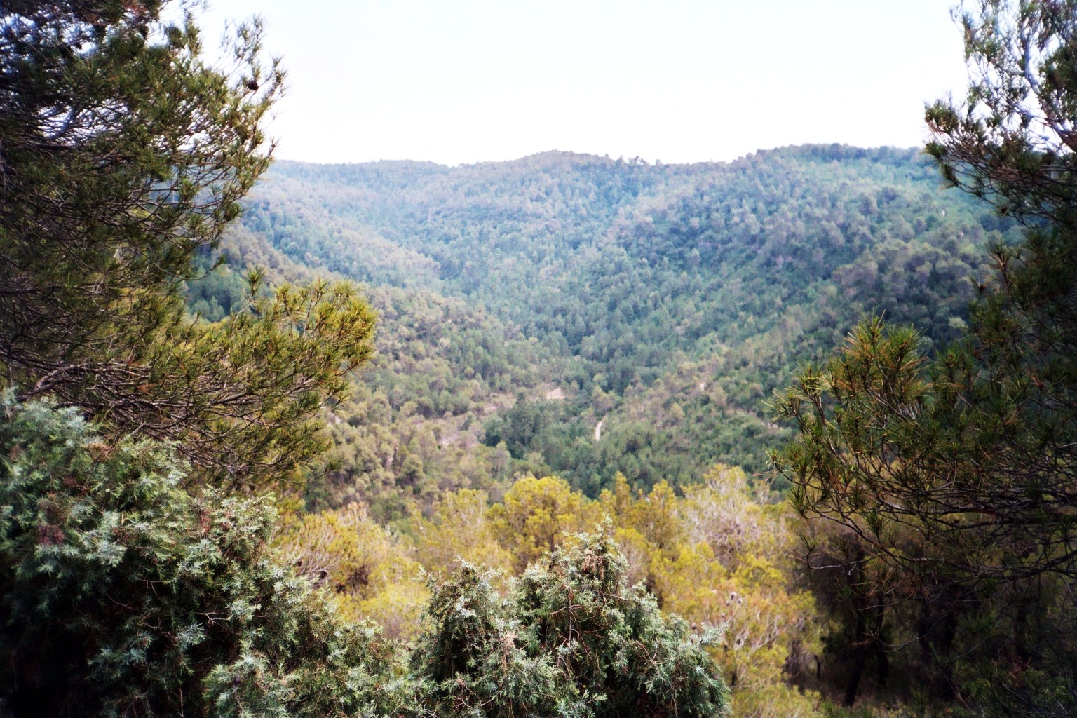 Torrent de Mussarra (Calders i Monistrol de Calders, Moianès)